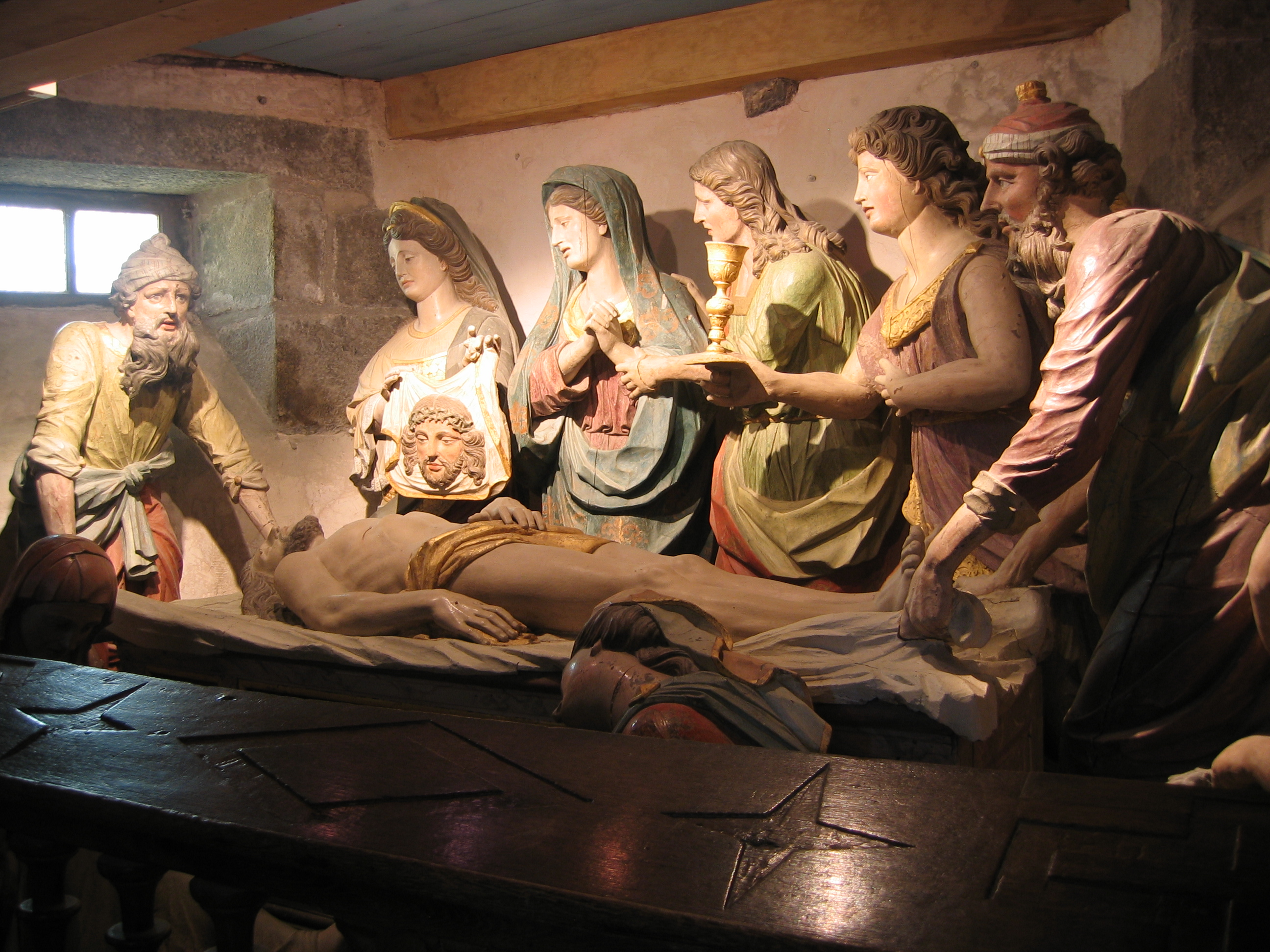 Mise au tombeau de Christ enclos paroissial de Saint Thégonnec